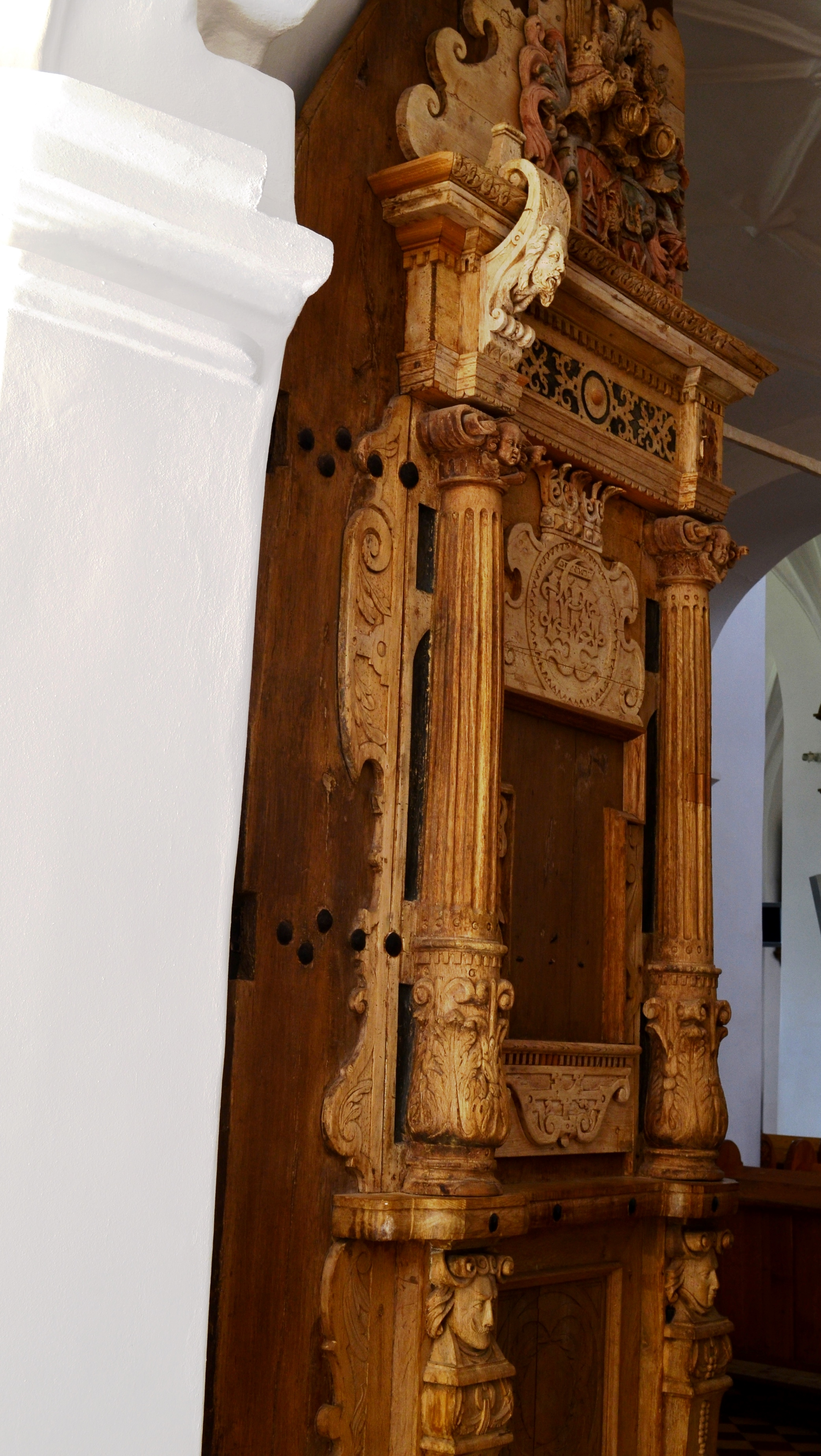 Kretingos bažnyčios medinės durys